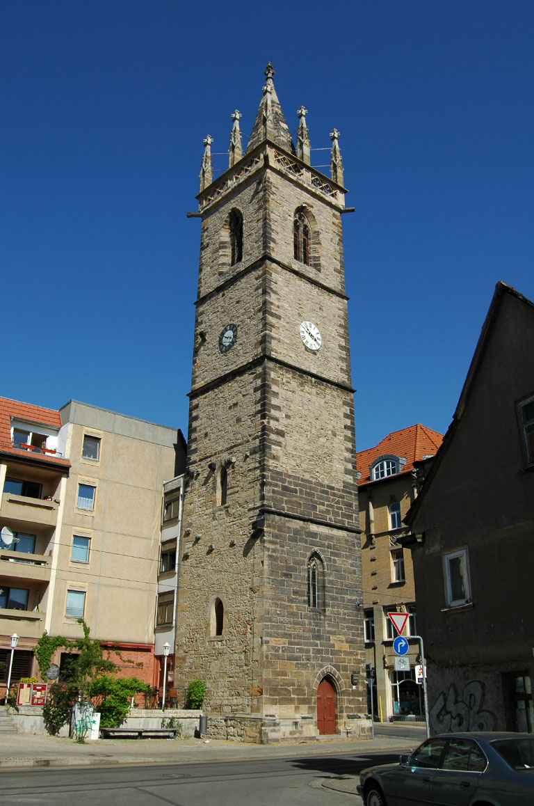 Johannesturm (errichtet im 12. Jahrhundert) an der Ecke Francke-/Johannesstraße